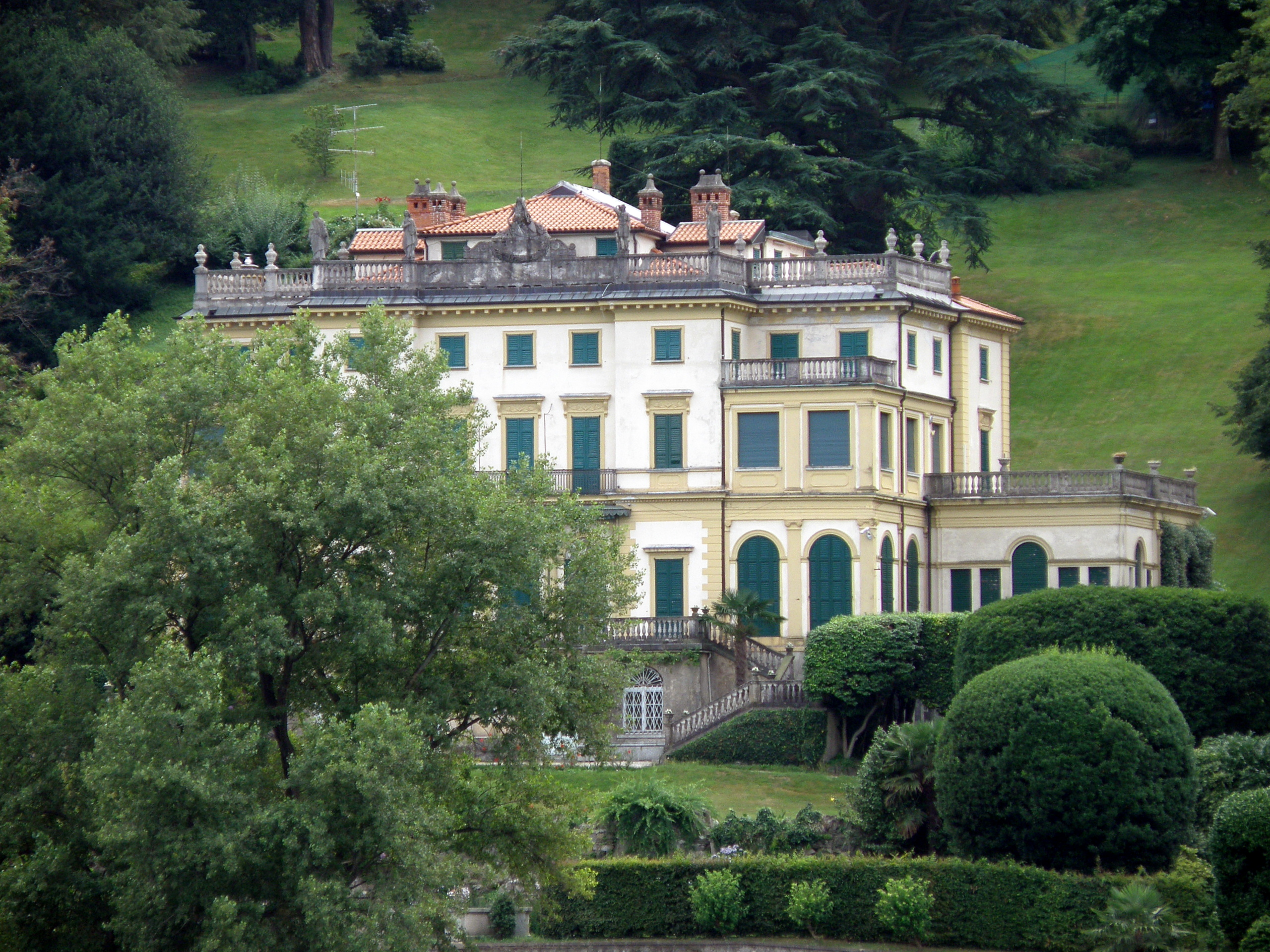 Stresa (VB). Villa Pallavicino, vista dal batello.